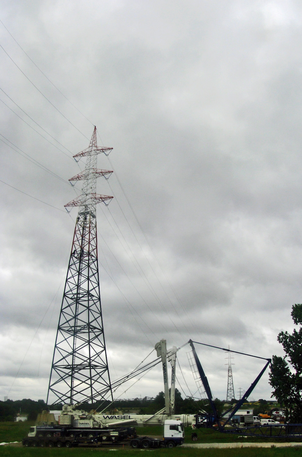 Freileitungskreuzung von Voerde während der Beendigung der Sanierungsarbeiten im Juli 2015, vorne nördlicher Mast in Götterswickerhamm